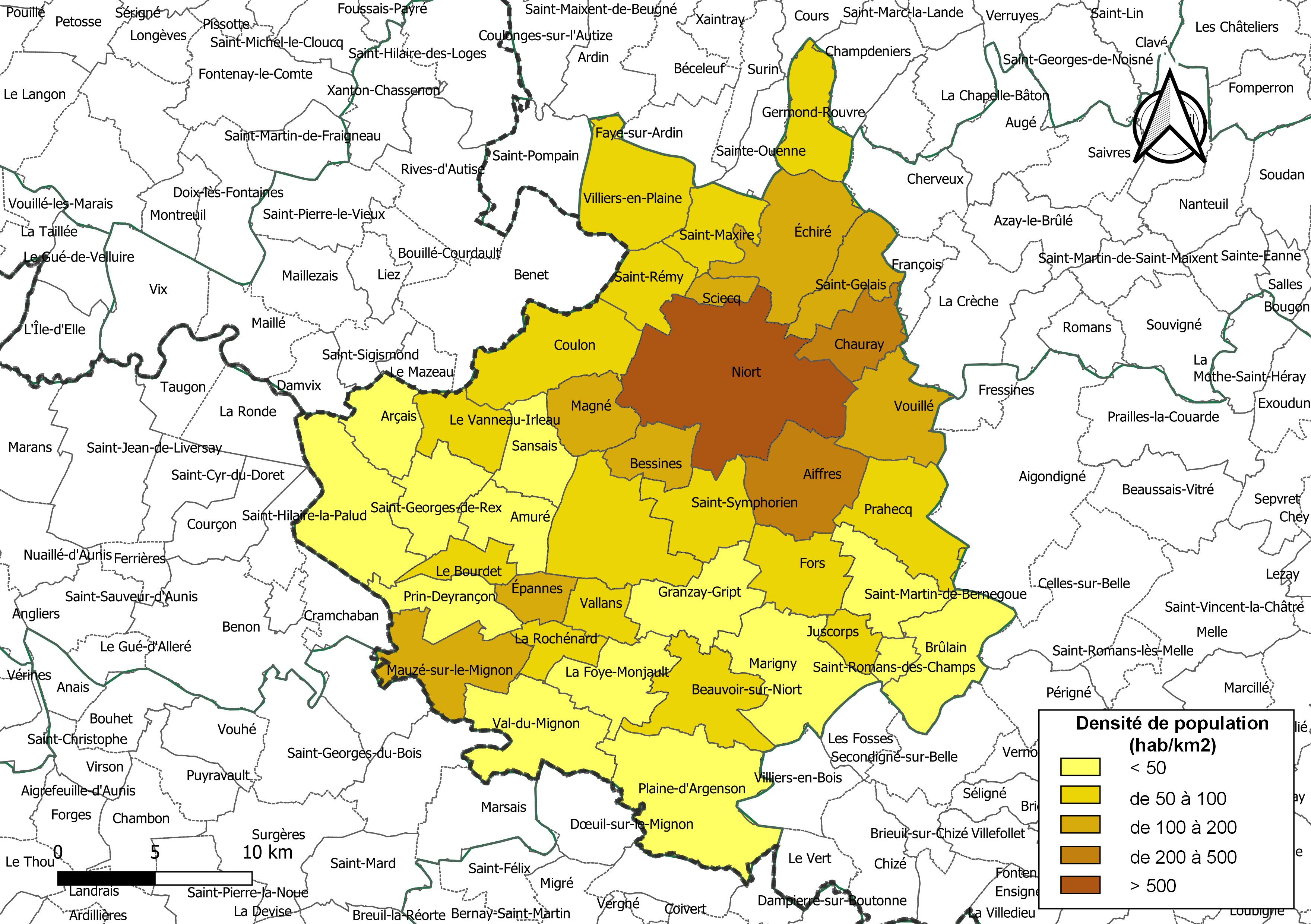 Carte des densités de population (millésimée 2016) des communes de la Communauté d'agglomération du Niortais, département des Deux-Sèvres, France. Composition au 1er janvier 2019.